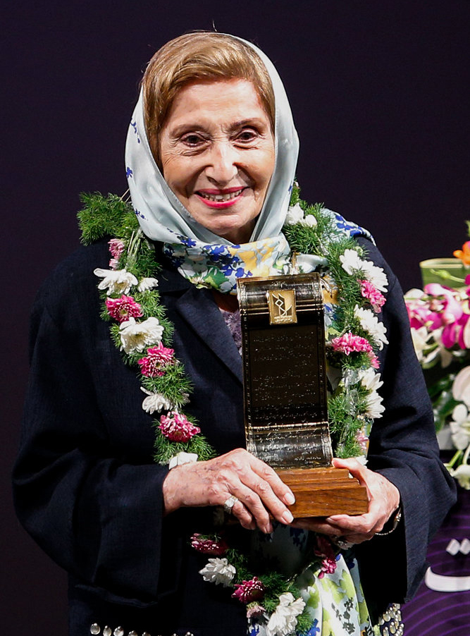 فخری ملک‌پور در مراسم نکوداشتش ۶ شهریور ۱۳۹۶ تالار وحدت تهران